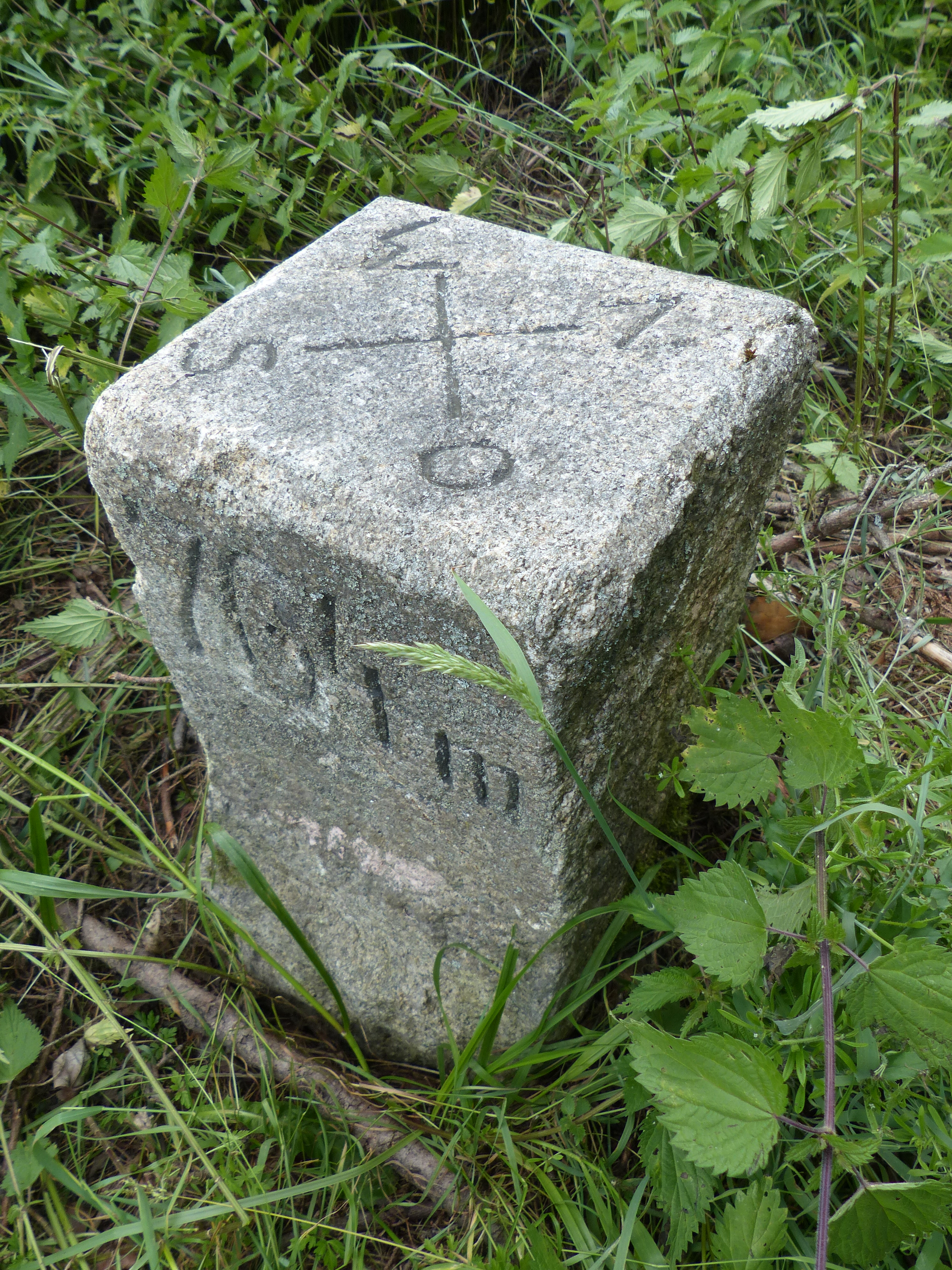 Areal Weidenbrunnen Waldstein